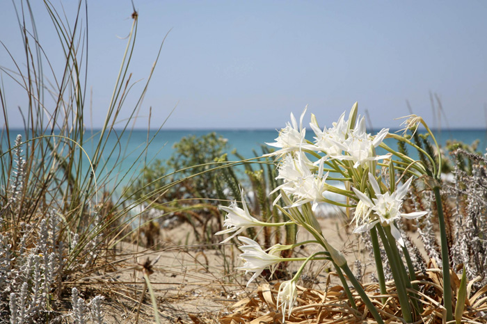 giglio sulle dune